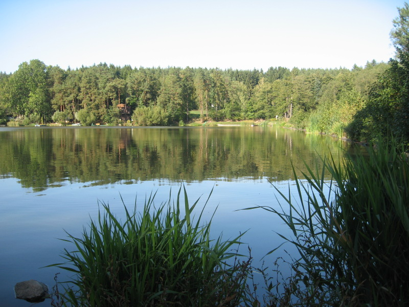 Níhovský rybník Bařina, u místních známý spíše pod názvem "Hájenka"